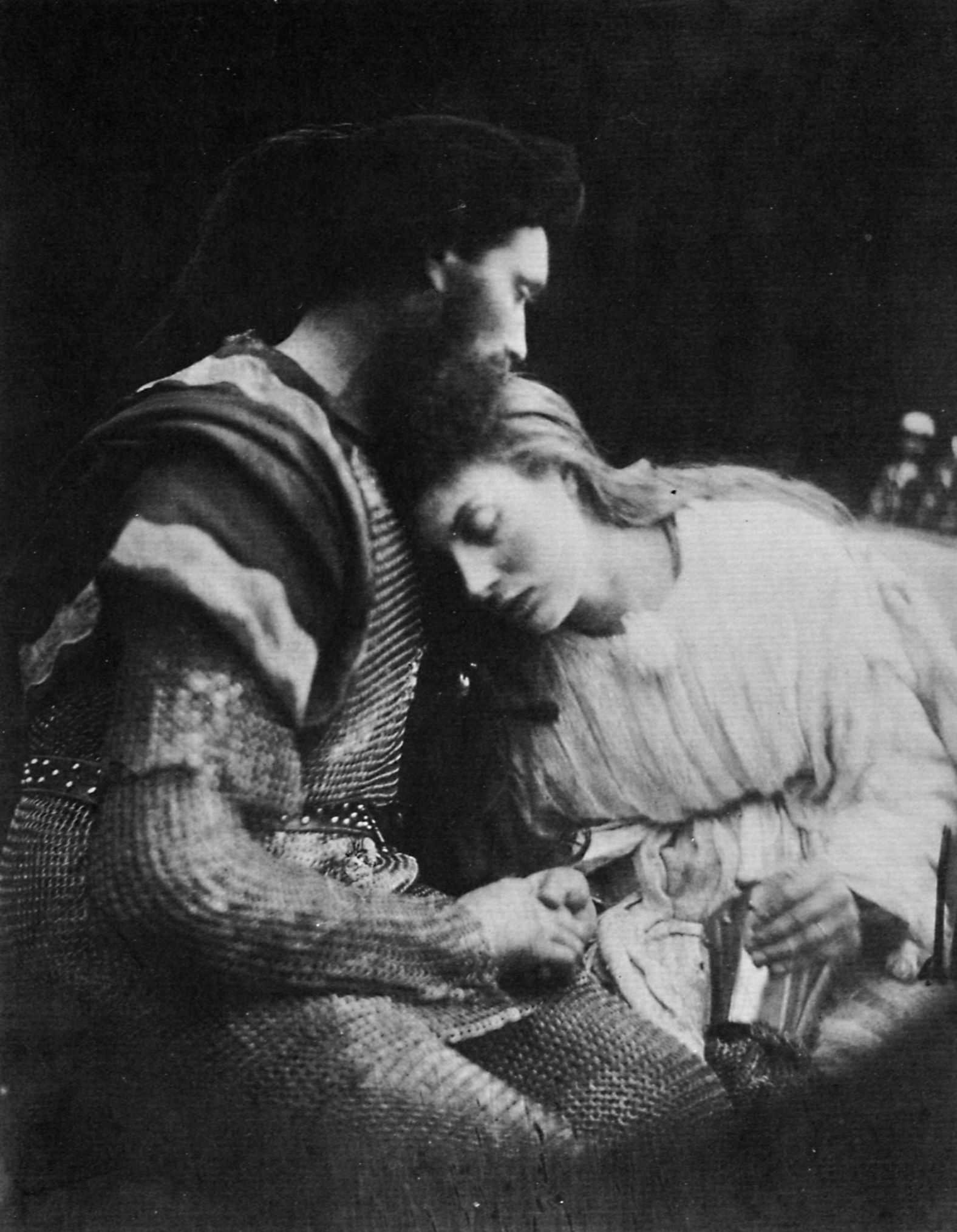 Julia Margaret Cameron: Fotografische Illustration "Der Abschied von Sir Lancelot und Königin Guinevere".